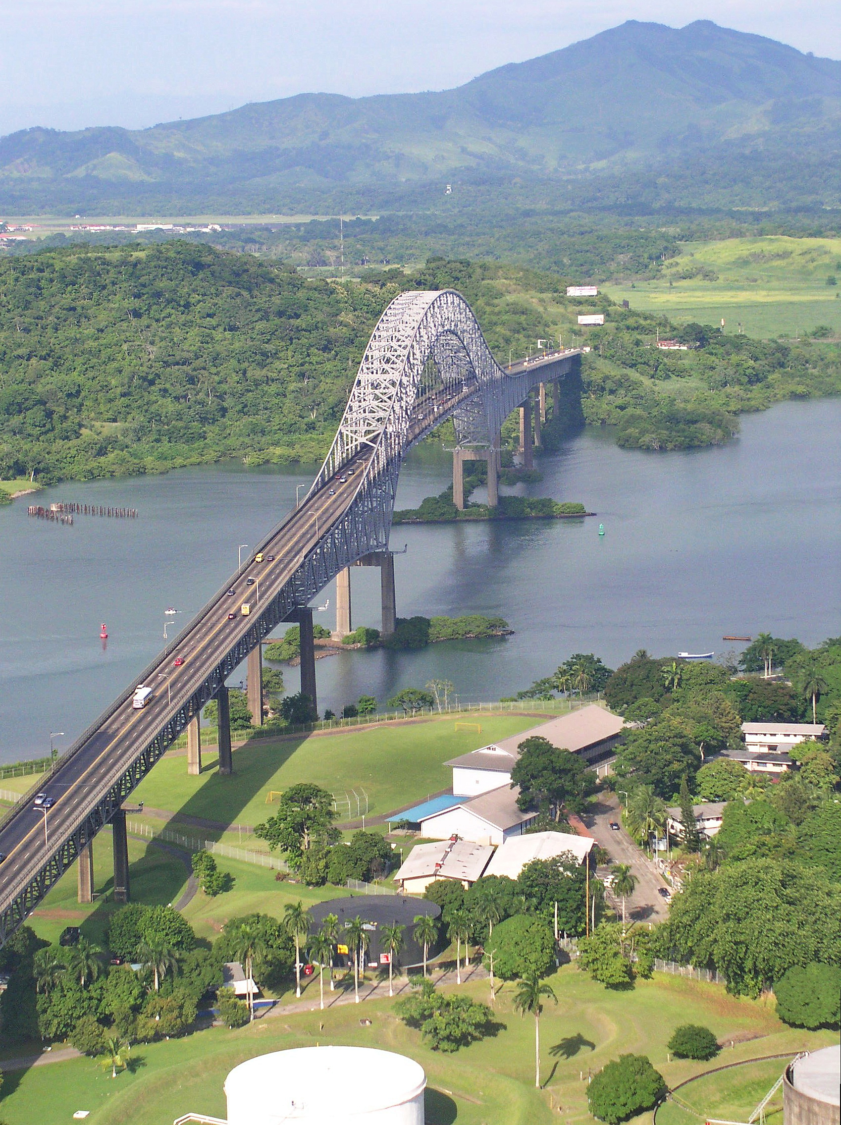 Puente de las americas